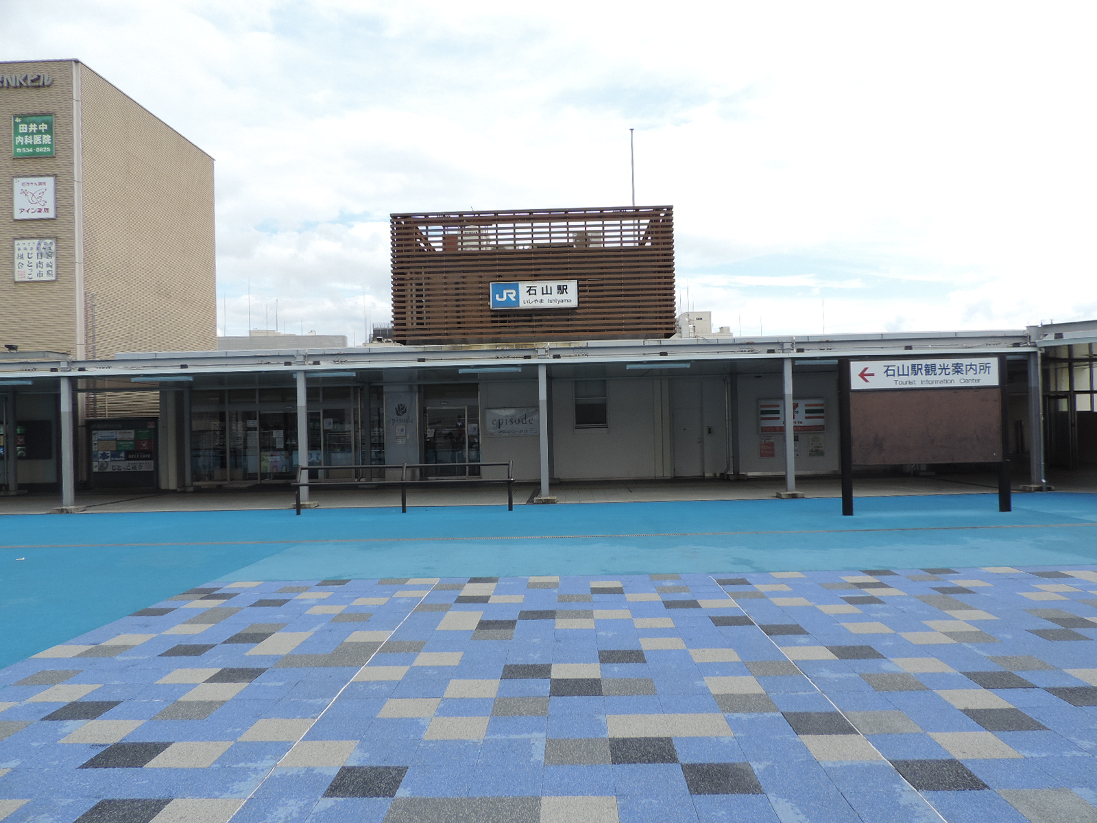 石山駅（滋賀県大津市）。2020年6月撮影